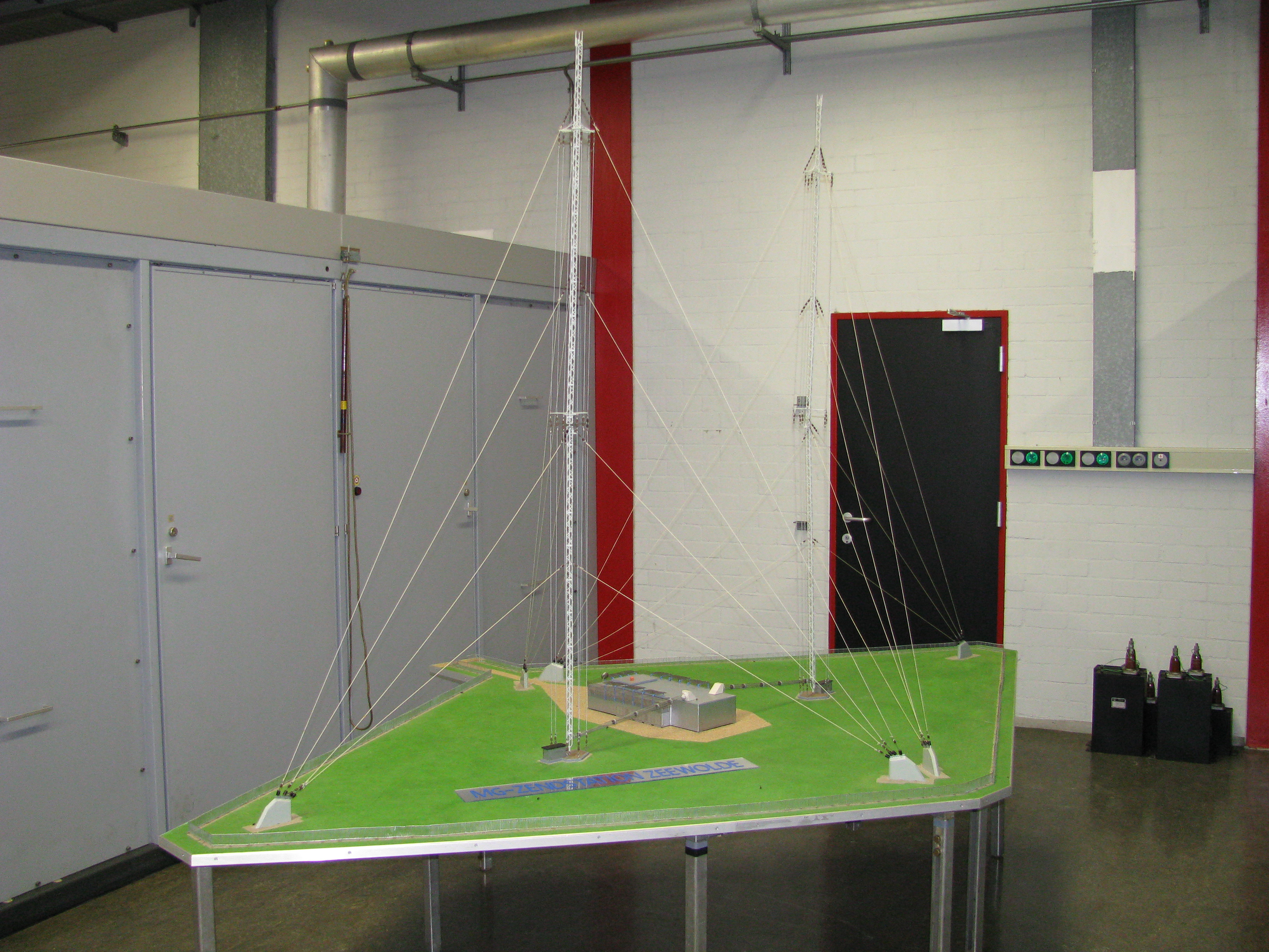 Modell der Mittelwellen-Antennenanlage